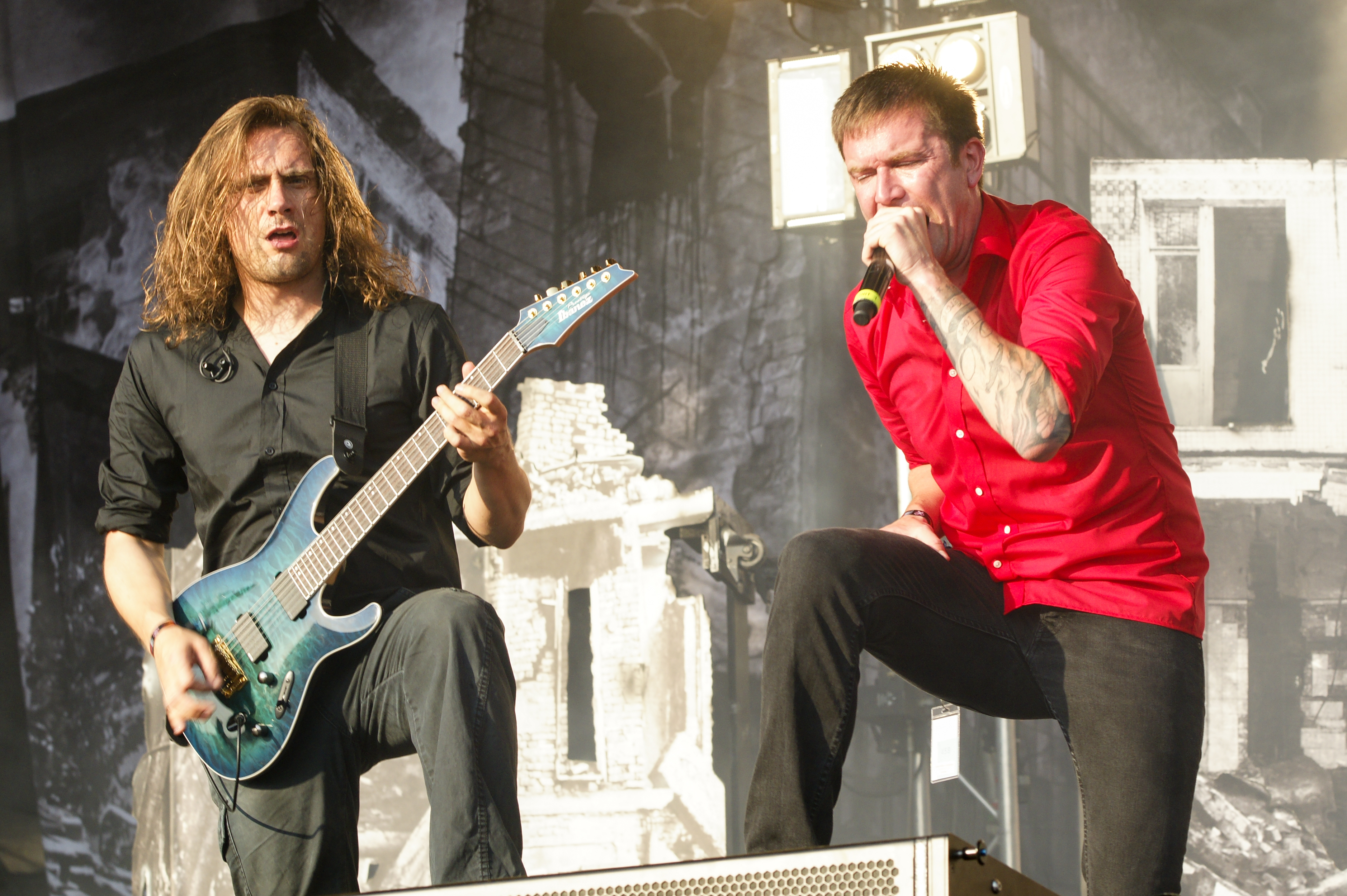 Deichbrand-Festival Seeflughafen Nordholz/ Cuxhaven Heaven Shall Burn auf der Fire-Stage